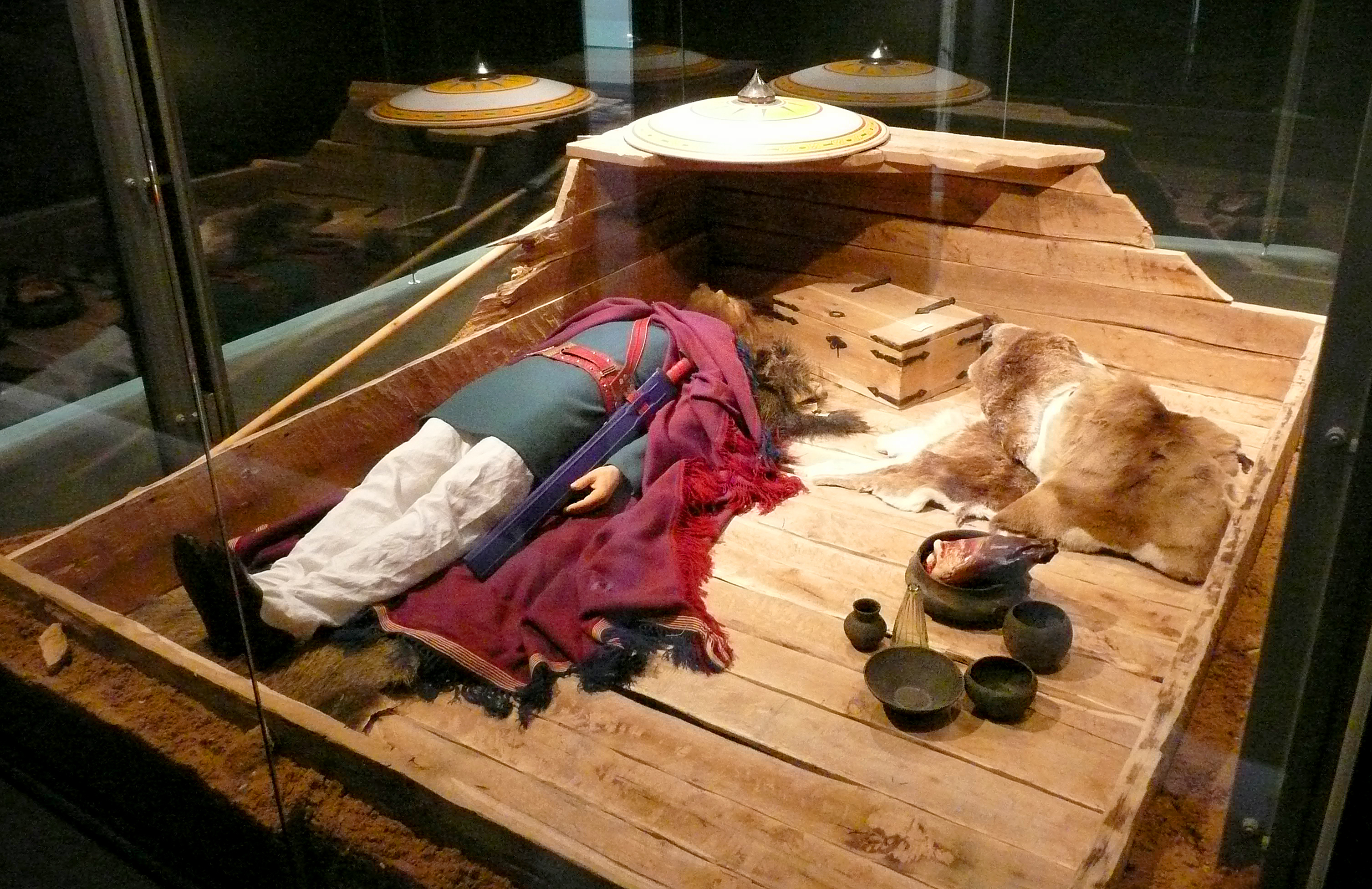 Nachbildung des 1990 entdeckten Grabes des Kriegers von Kemathen im Römer und Bajuwaren Museum auf der Burg Kipfenberg im oberbayerischen Landkreis Eichstätt.